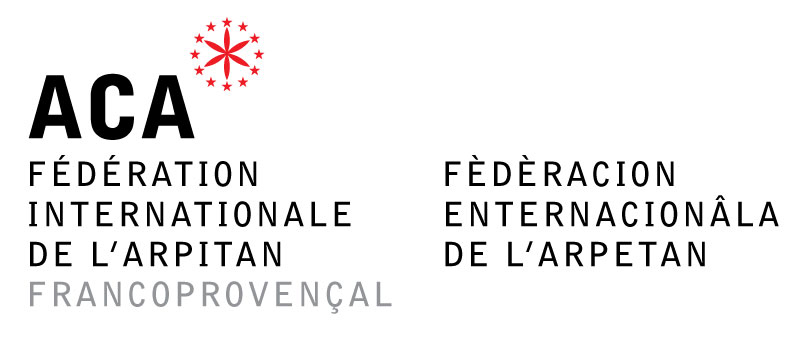 Arpetan: Émâge de marca de l'ACA - Fèdèracion enternacionâla de l'arpetan / francoprovençâl